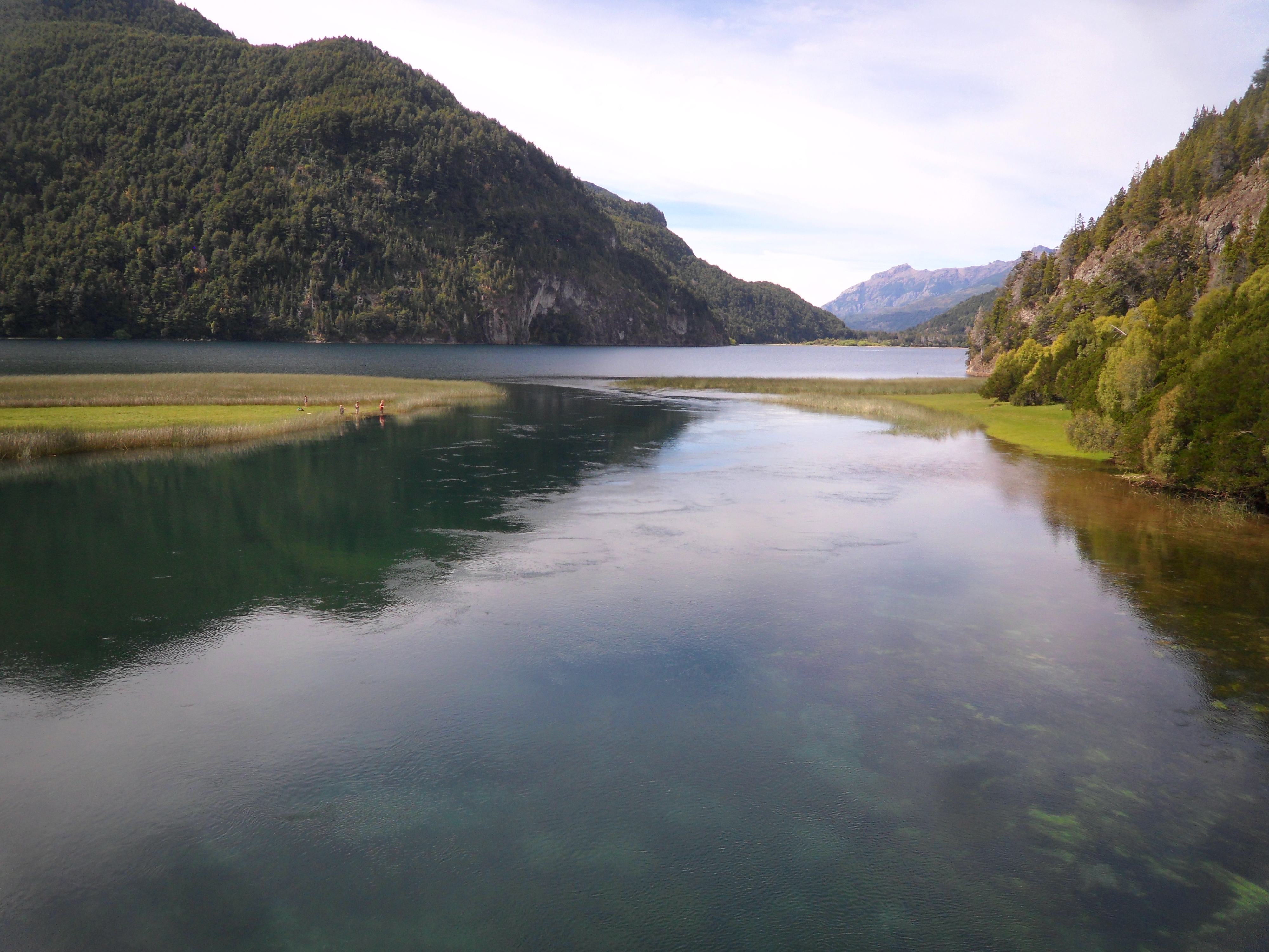 Pasarela del rio Arrayanes.